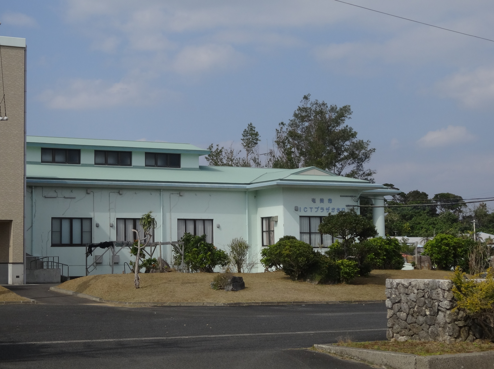 ICTプラザかさり（鹿児島県奄美市笠利町）